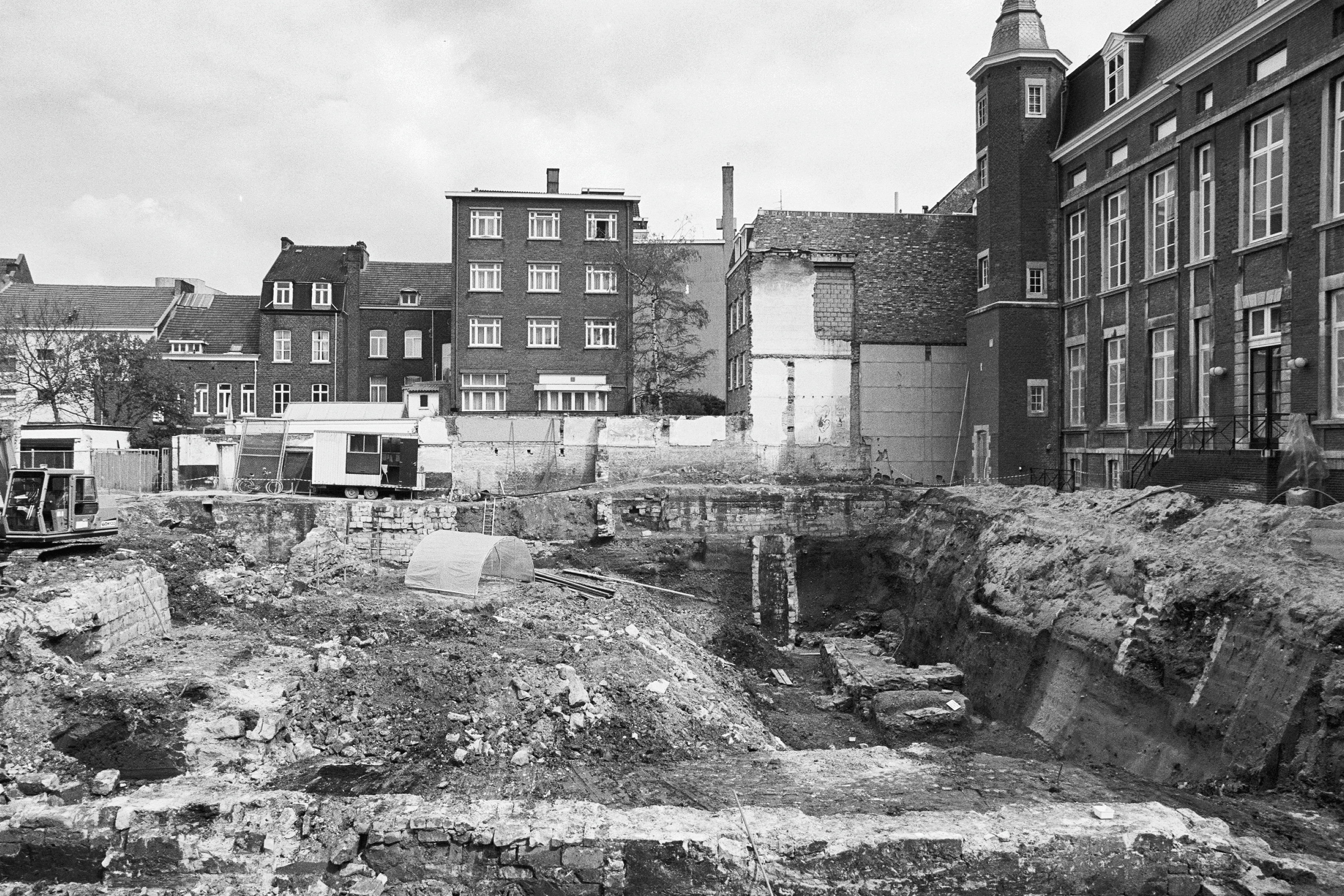 Exterieur OPGRAVINGEN